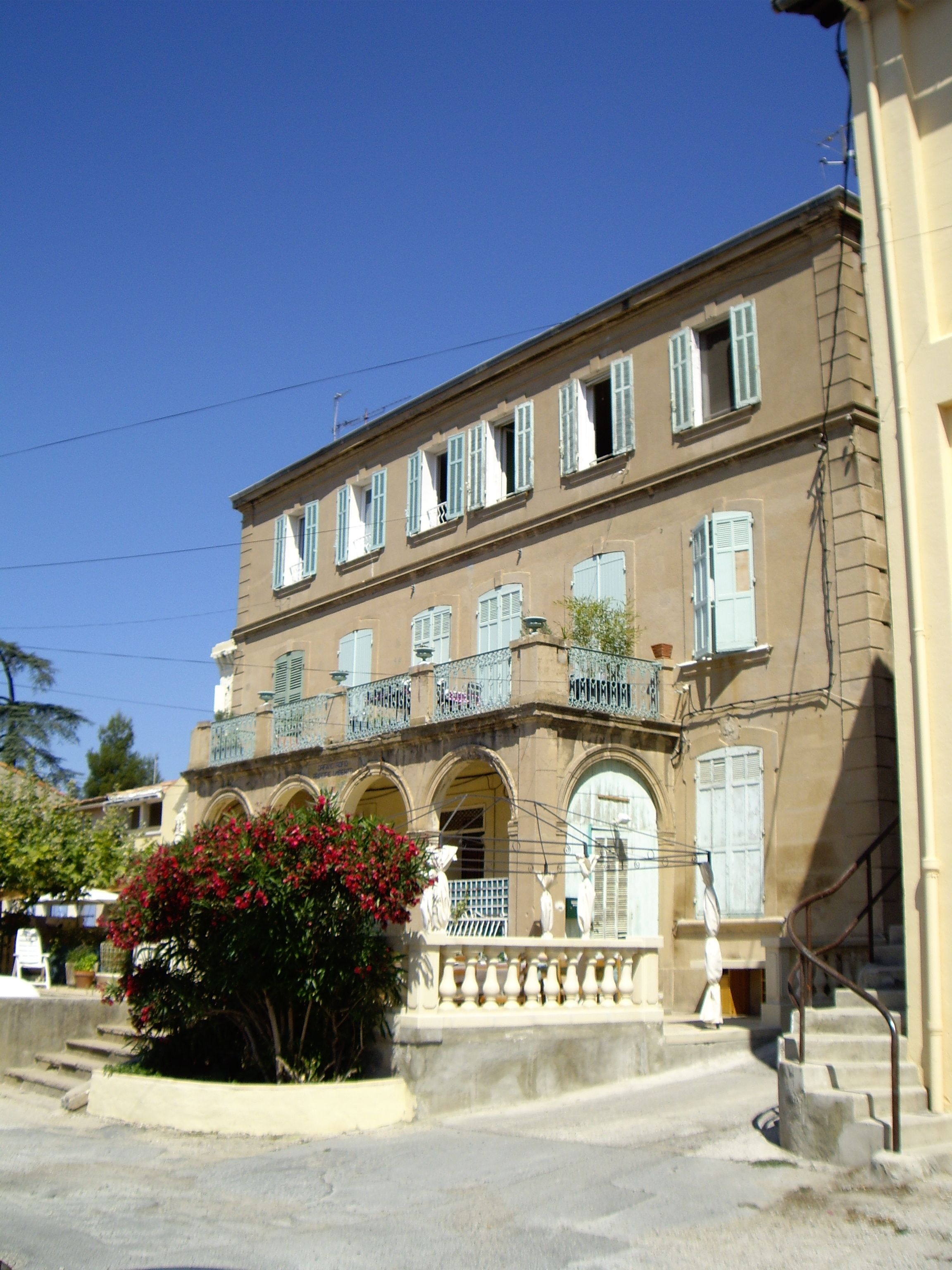 Ancien orphelinat italien, 15 Impasse du Bon Coin, dans le quartier de L'Estaque et le 16e arrondissement de Marseille.